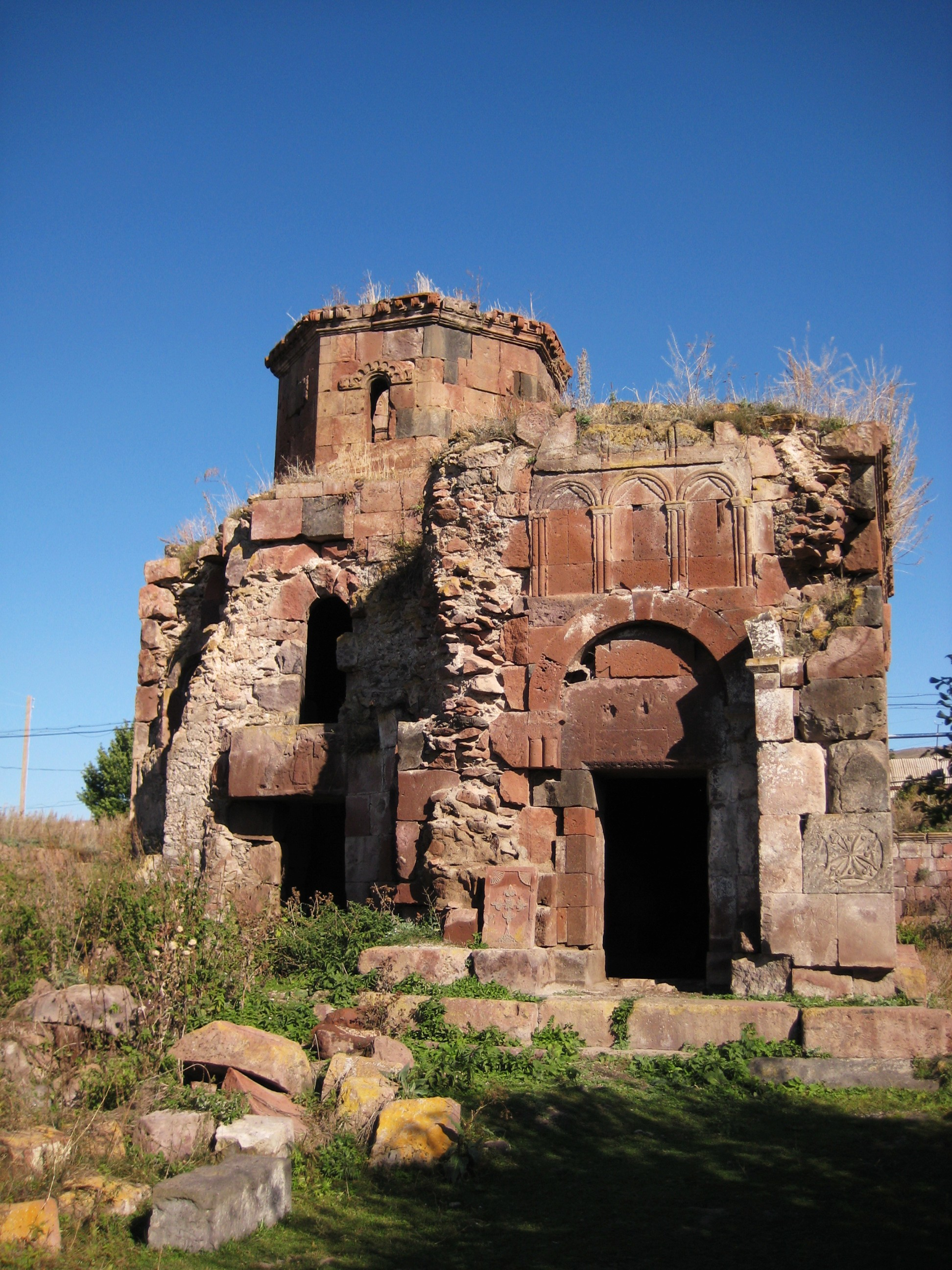 Pemzashen Church